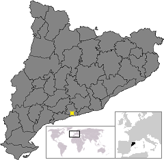 Localització del Vendrell . Location of El Vendrell in Catalonia.